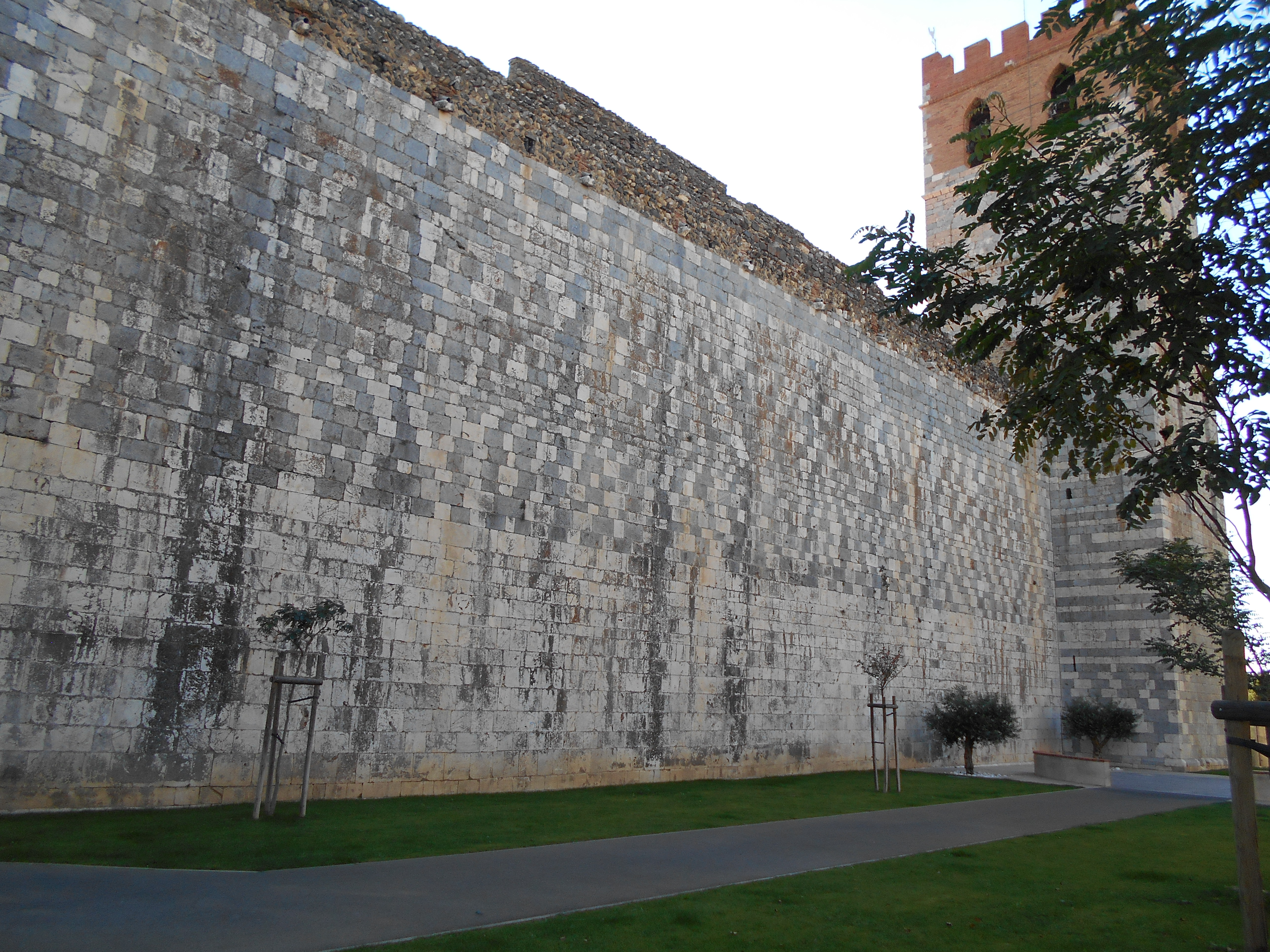 Santa Maria d'Espirà de l'Aglí